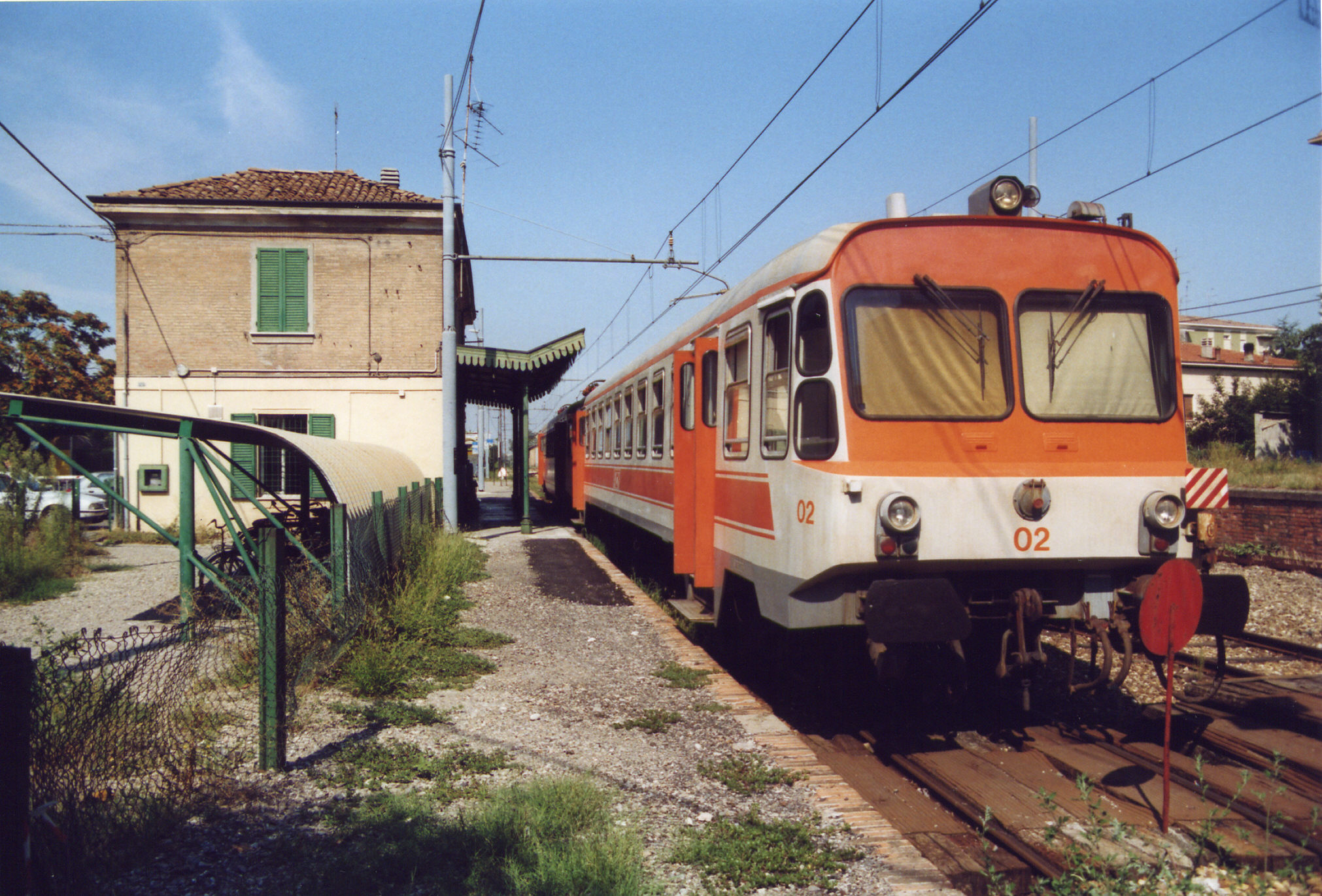 Elettrotreno 02 dell'ATCM in sosta a Sassuolo